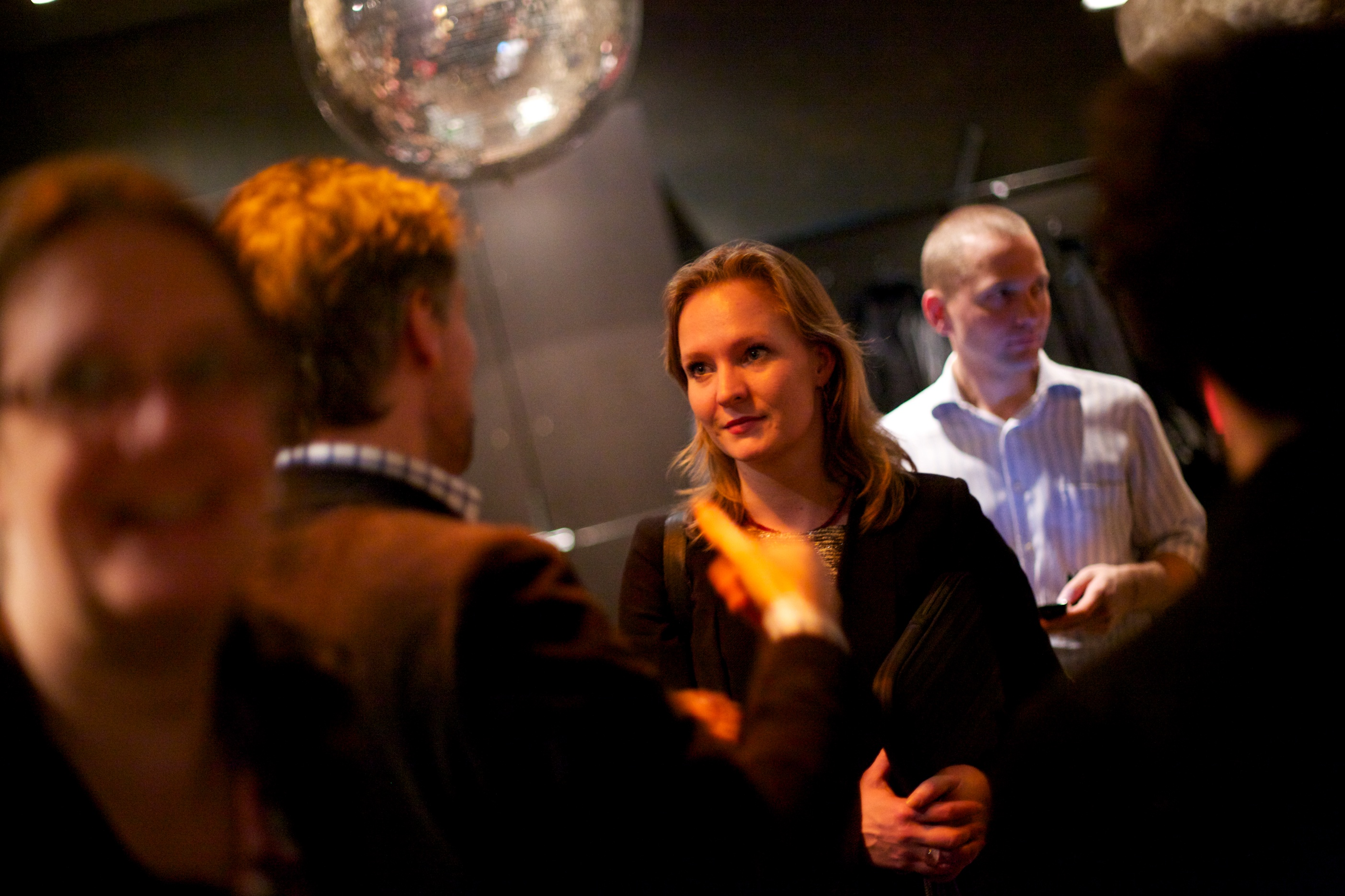 D-café: Internetvrijheid, met Marietje Schaake (EP), Afke Schaart (TK) en Bart Schermer (Considerati)